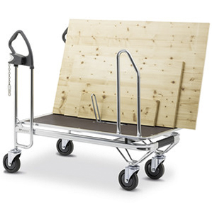 Großer Einkaufswagen mit 315 Leiter Korbvolumen im Einsatz in Schweden, Modell Wanzl "EL"